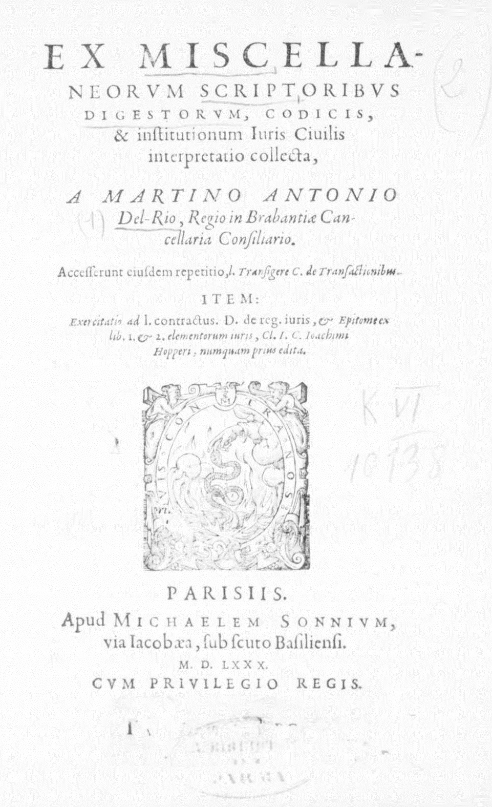 Frontespizio